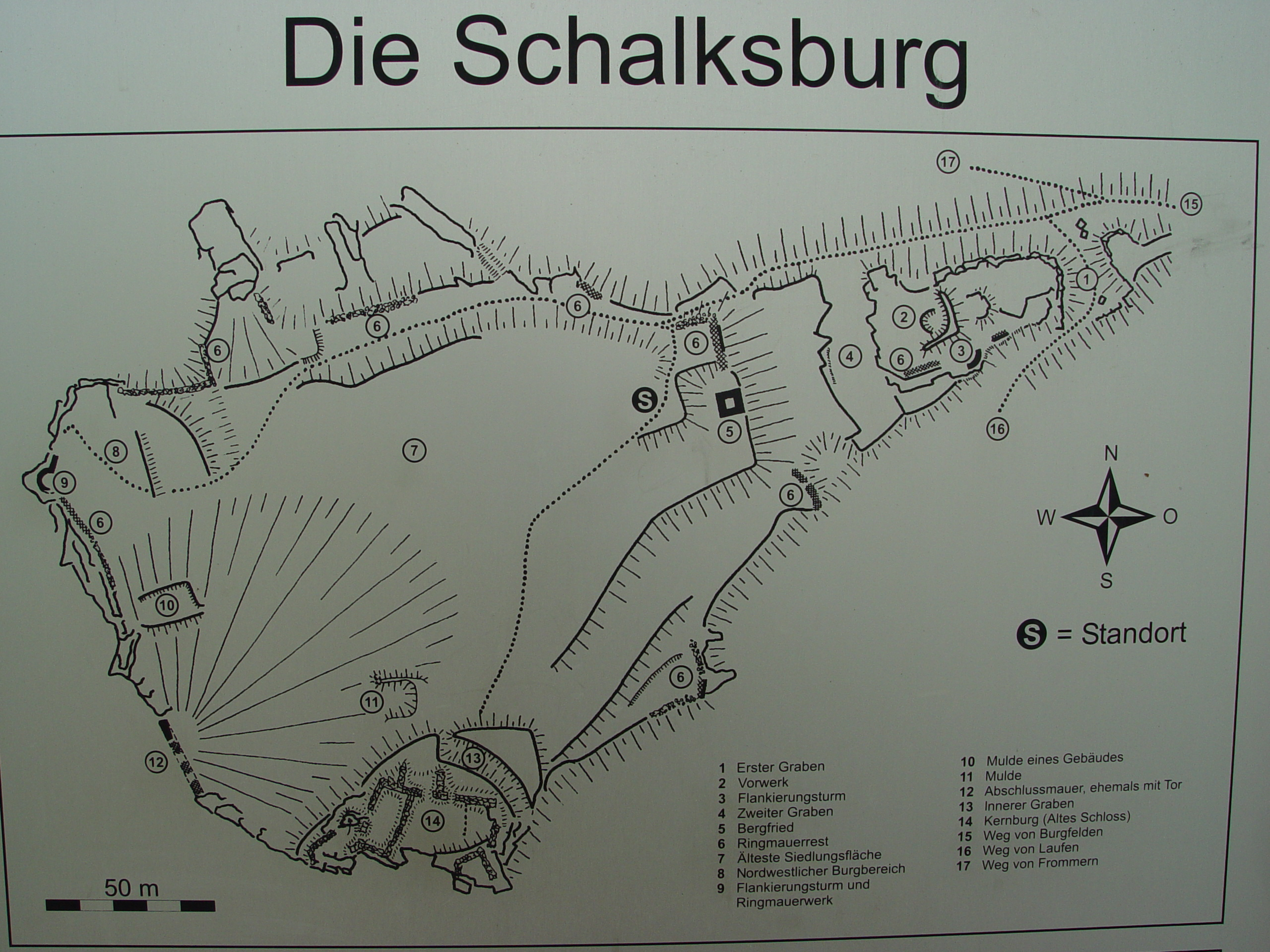 Abfotografierte Schautafel an der Schalksburg im Albstädter Stadtteil Burgfelden